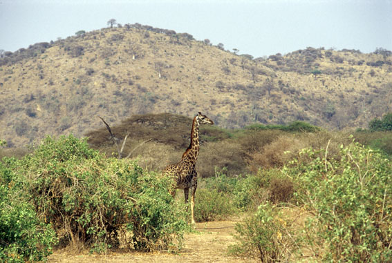 Lake Manyara National Park, giraffe